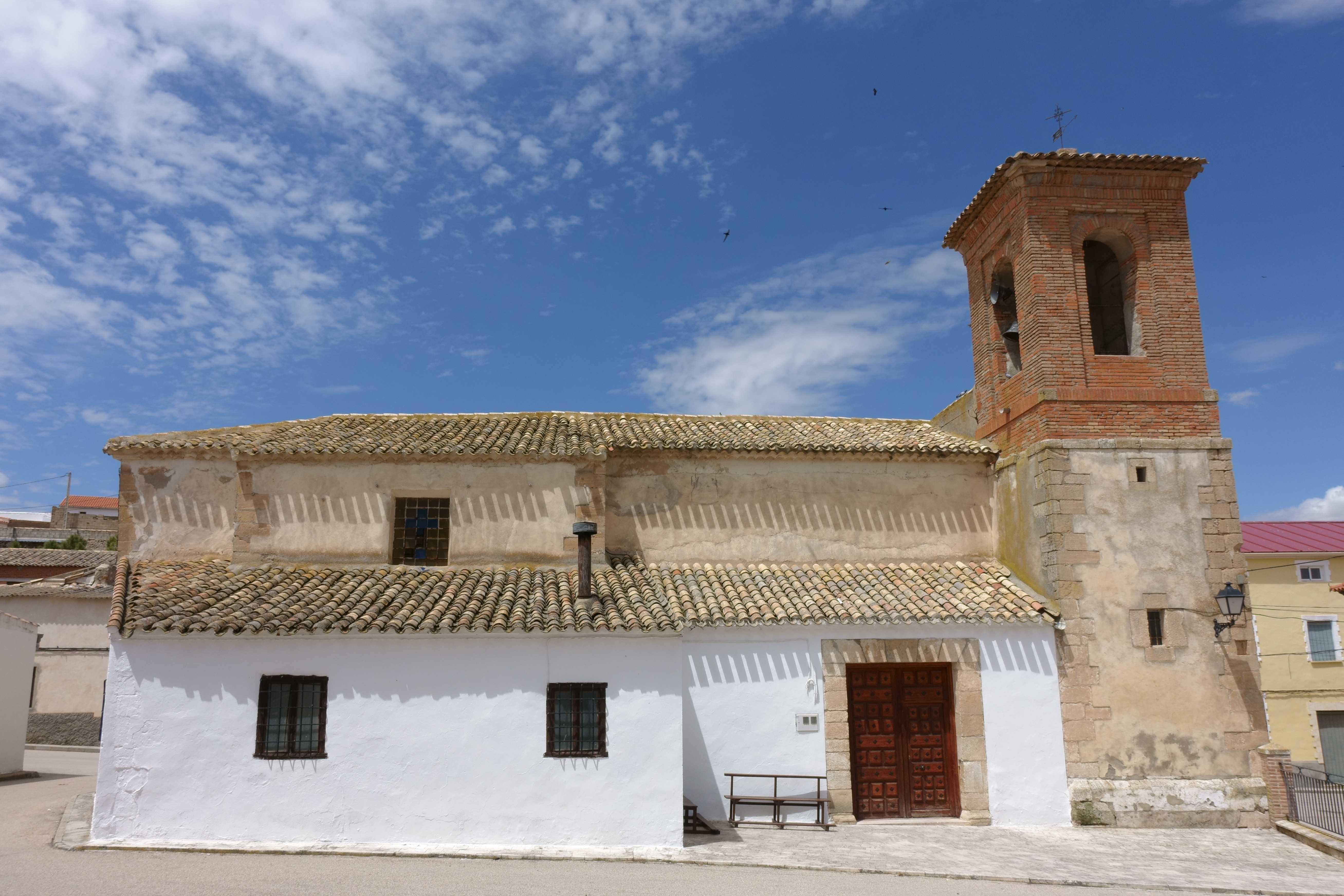 Iglesia de Nuestra Señora de los Remedios, en Villalgordo del Marquesado (Cuenca, España).